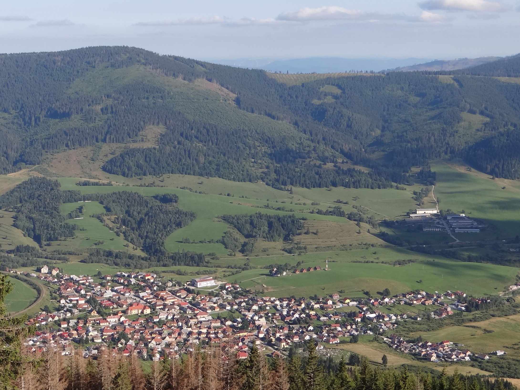 Telgárt